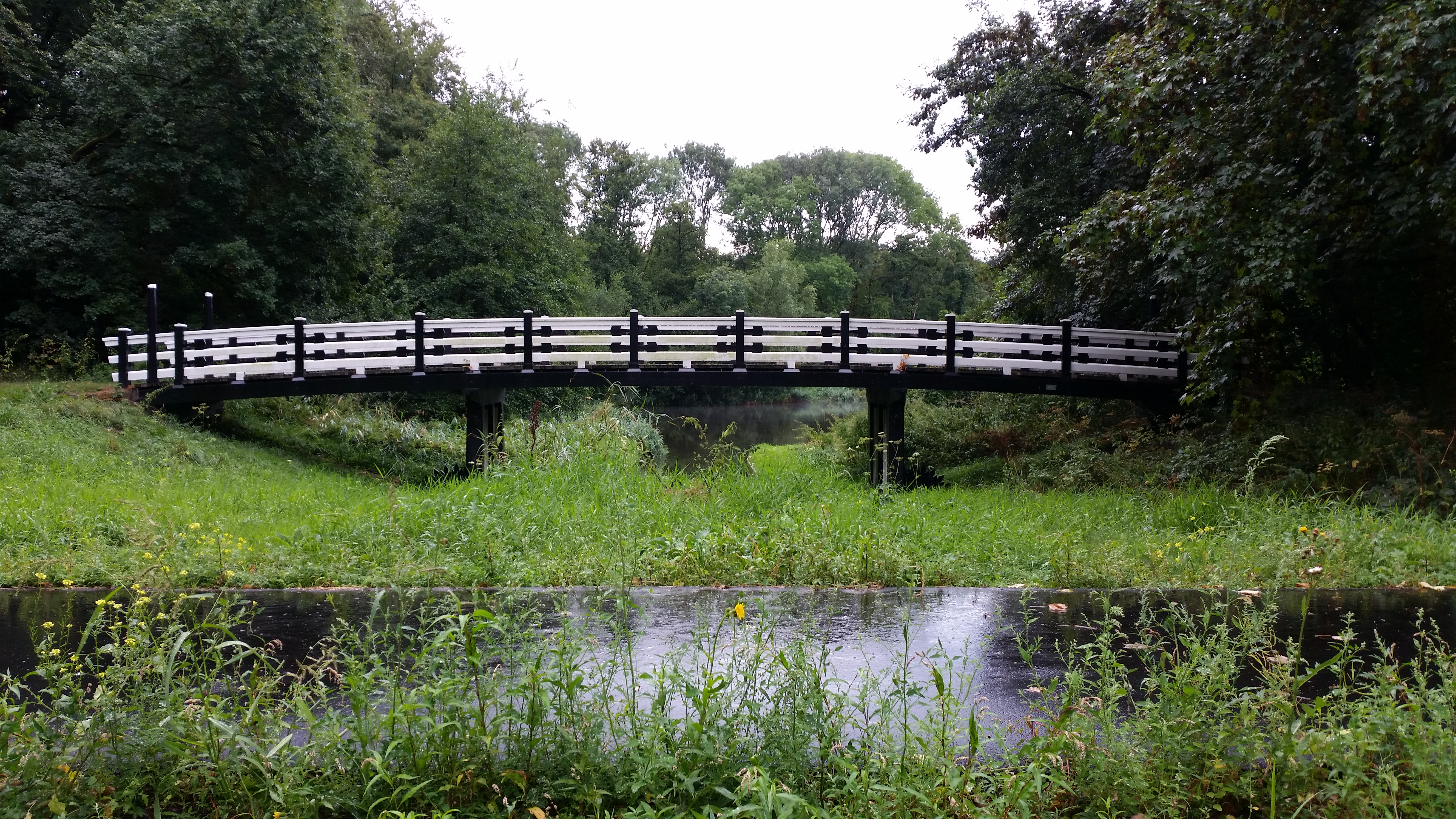 Brug 508 (in Amsterdam), de overspanning